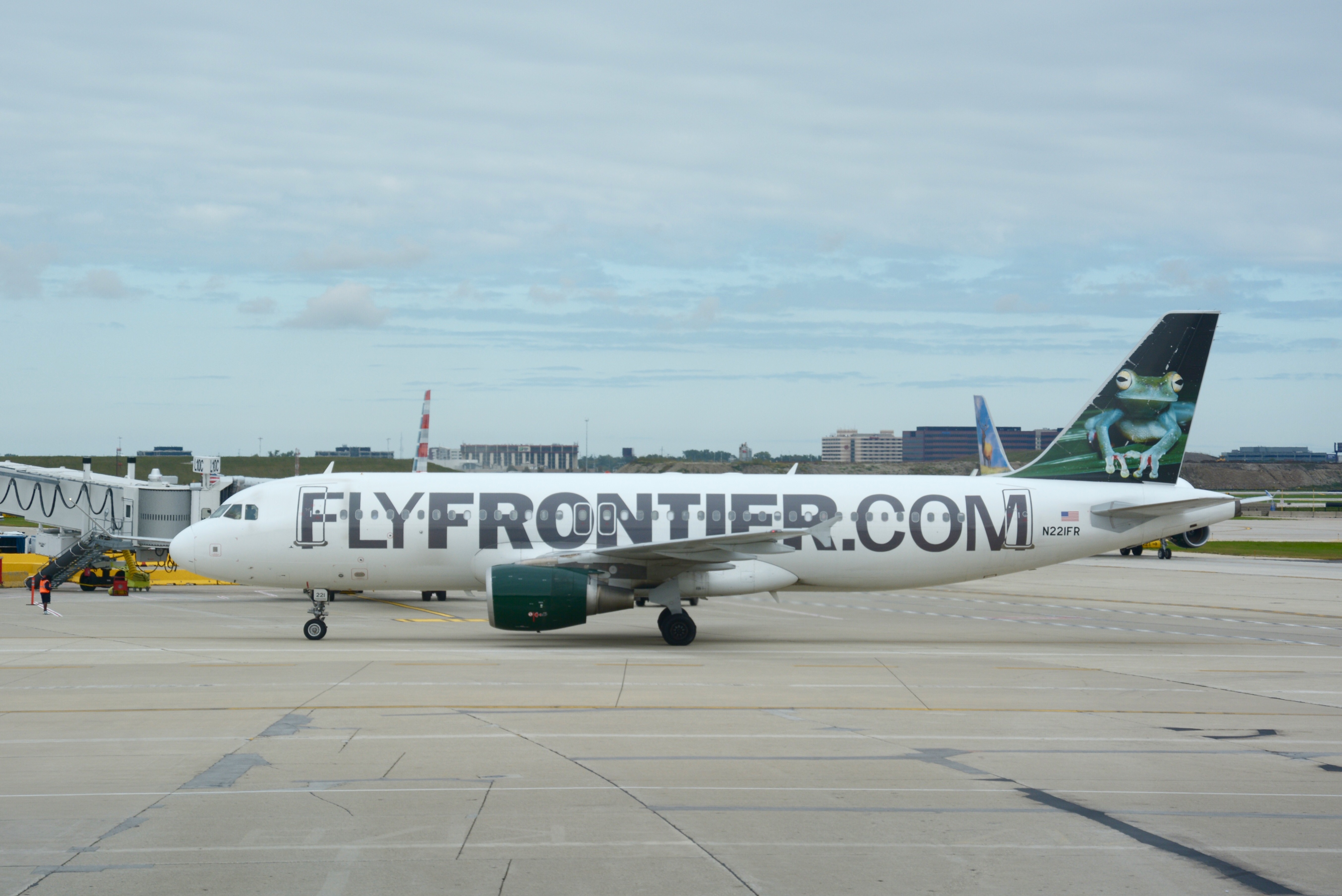 Frontier Airlines, Airbus A320-200 N221FR ORD